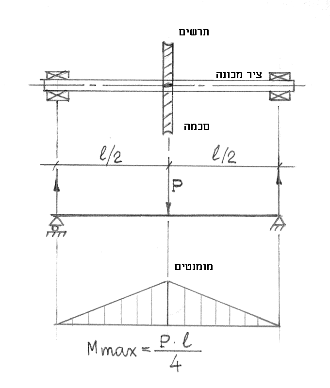 דוגמה למומנט כפיפה בציר של מכונה.